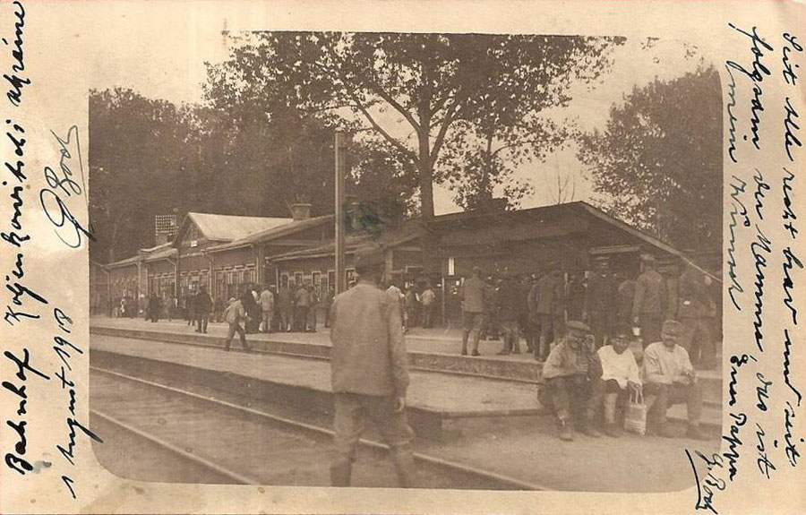 Беларуская (тарашкевіца): Каленкавічы (Kalenkavičy). Чыгуначная станцыя